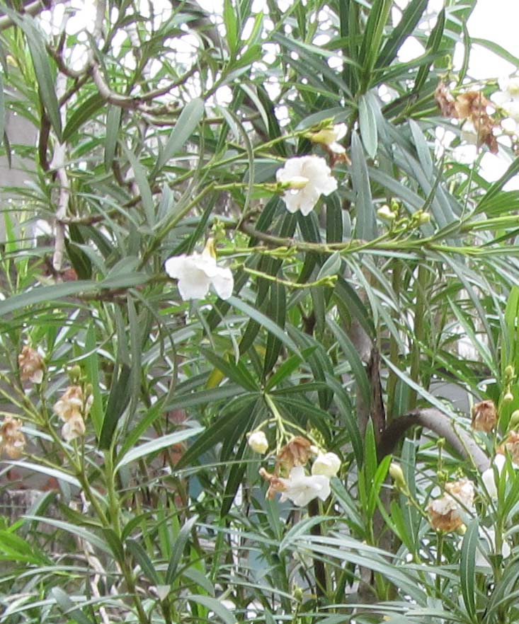 'Arali' flower after blossom. அரளிப் பூவின் முதிர்-பருவம்